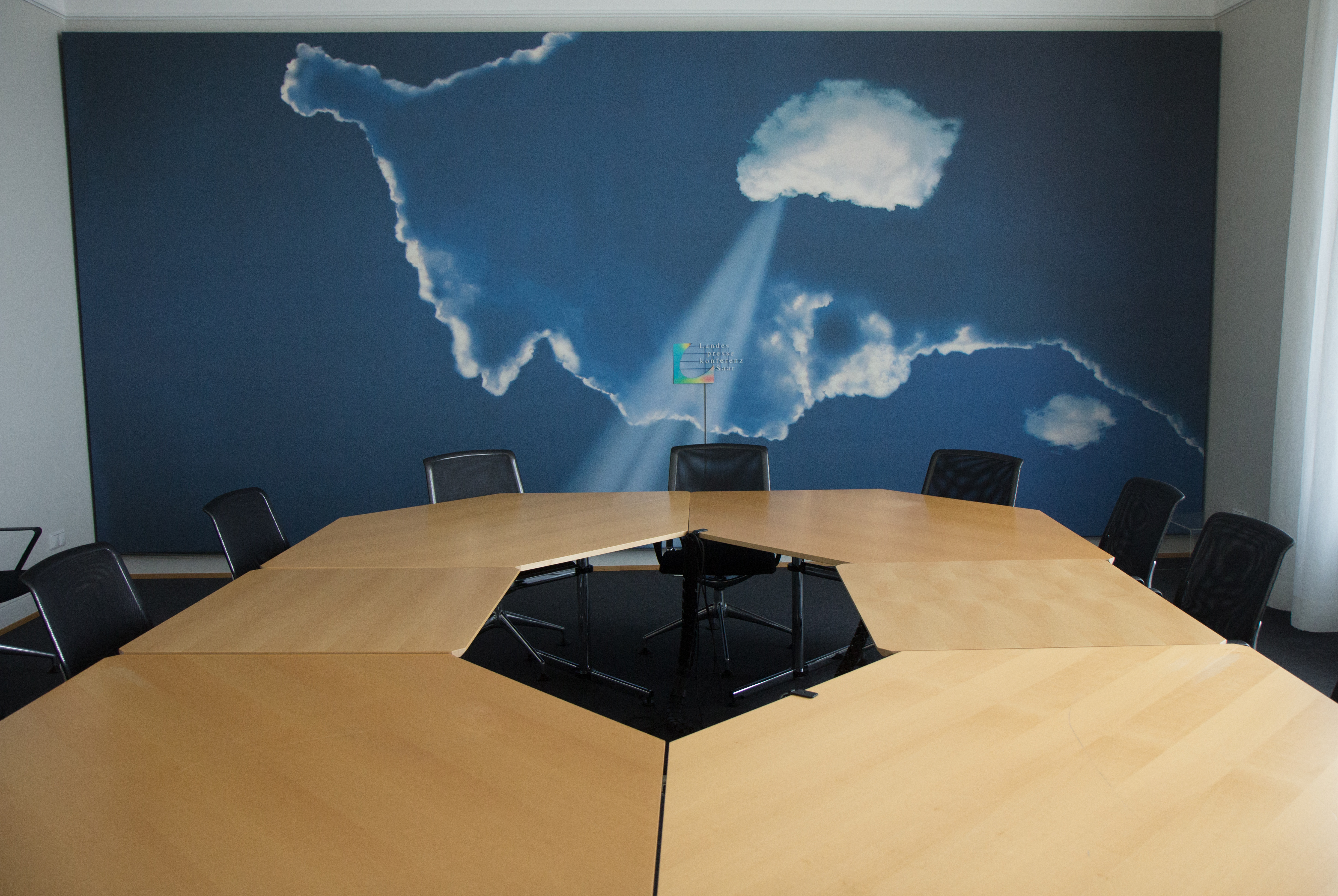 Saal der Landespressekonfernz Saar im Landtag des Saarlandes